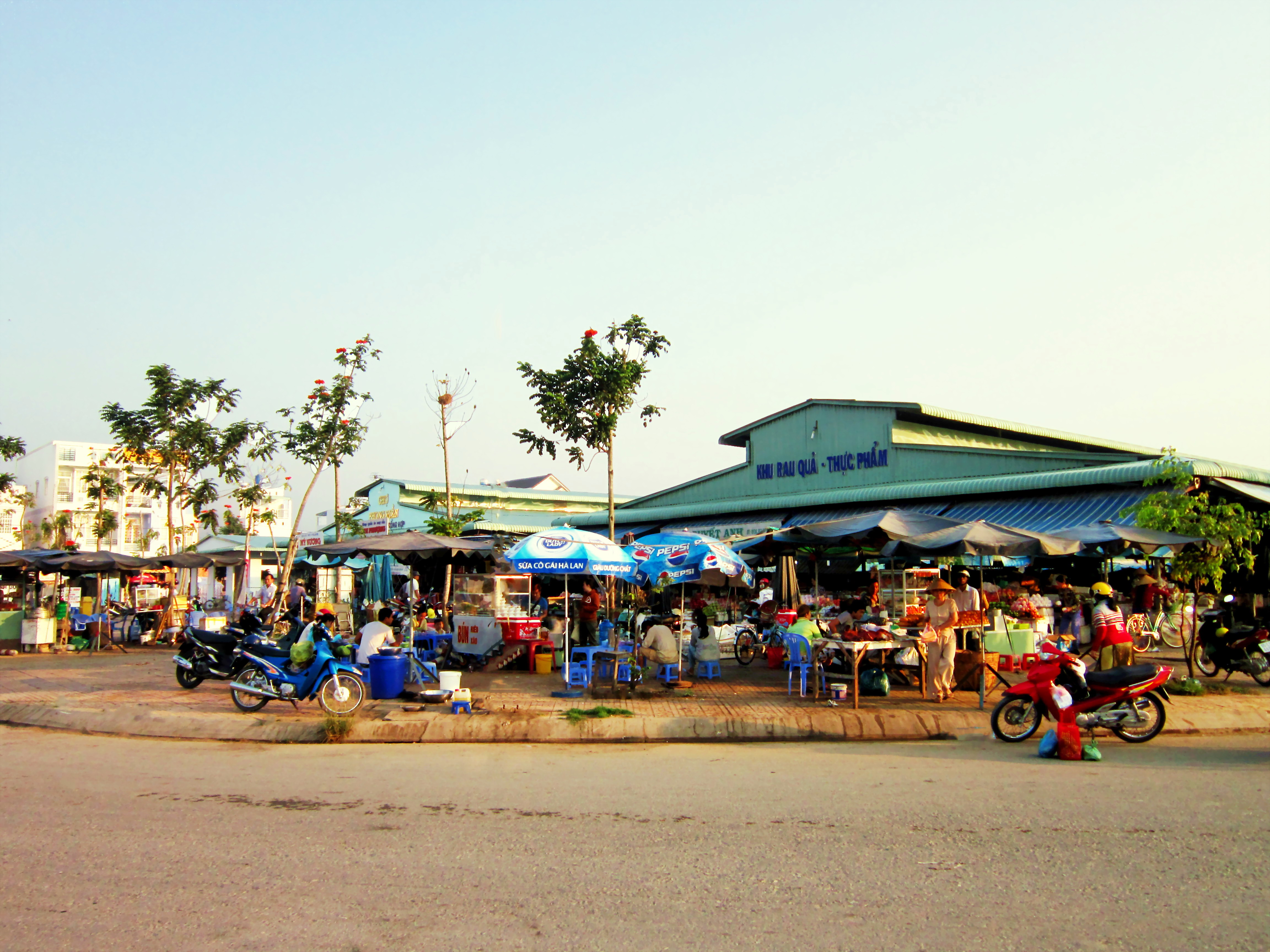 Khu chợ mới ở thị trấn Phong Điền, thành phố Cần Thơ, Việt Nam.